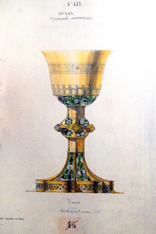 Пацір. Малюнак Д.Струкава